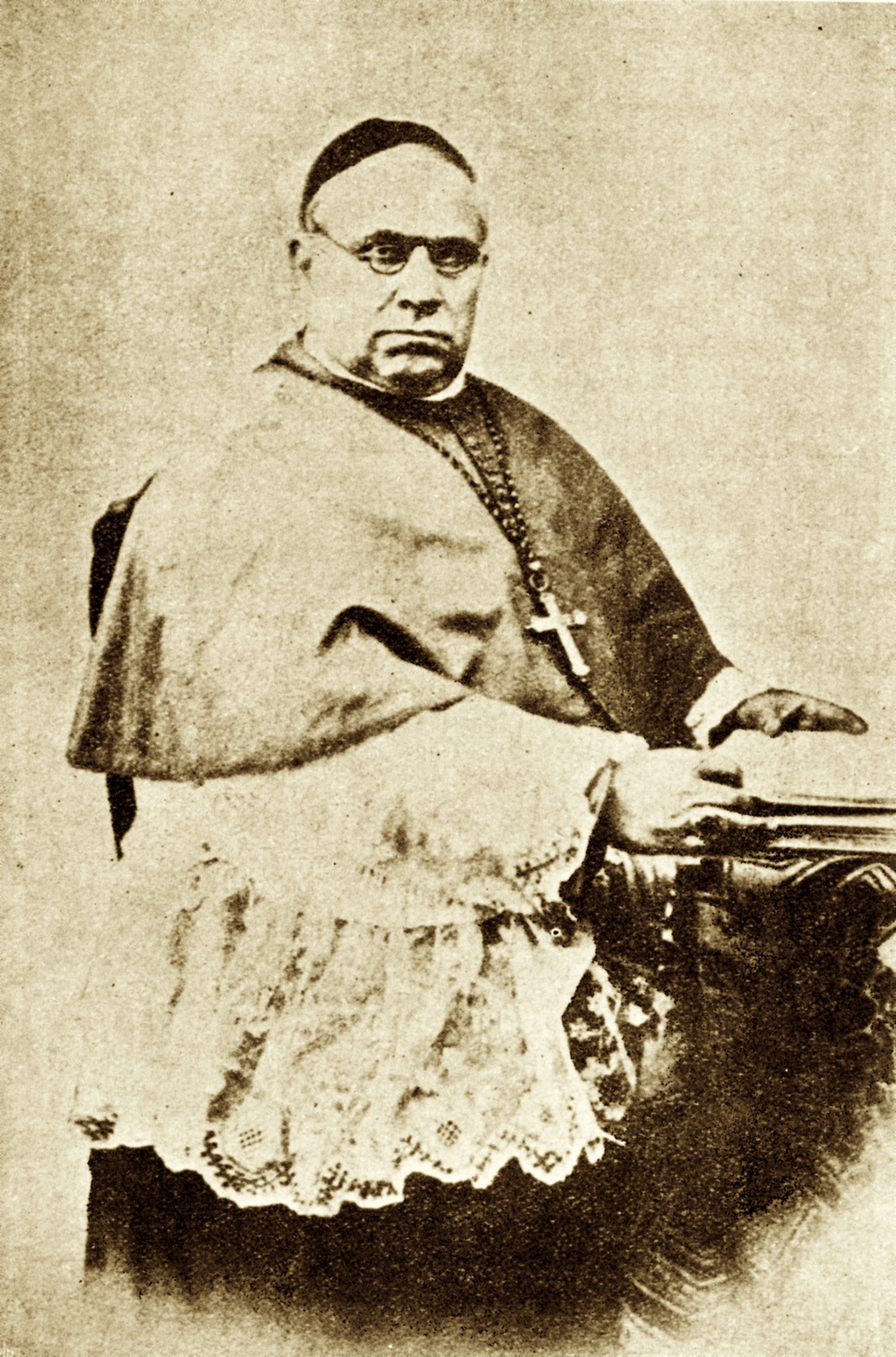 Portrait de l'évêque de Pékin, puis évêque de Porto, João de França Castro e Moura.